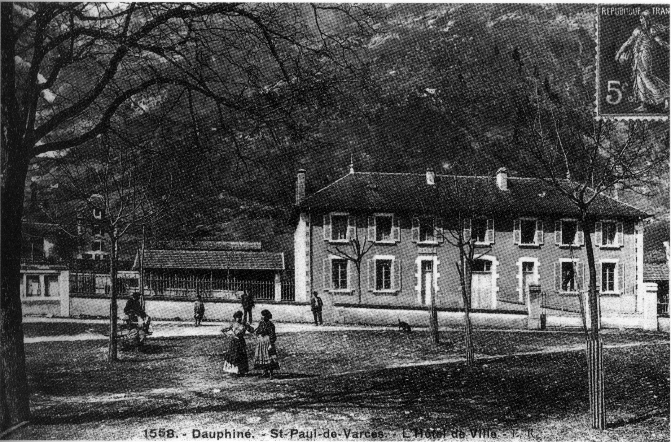 Saint-Paul-de-Varces, l'hotel de ville, 1909